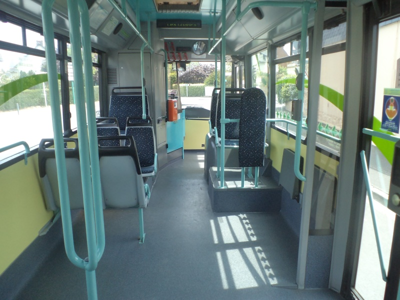 Van Hool A330 intérieur